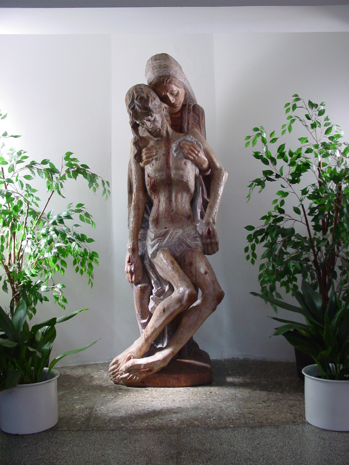 Pieta in der Pfarrkirche Liesing gestaltet von Josef Troyer